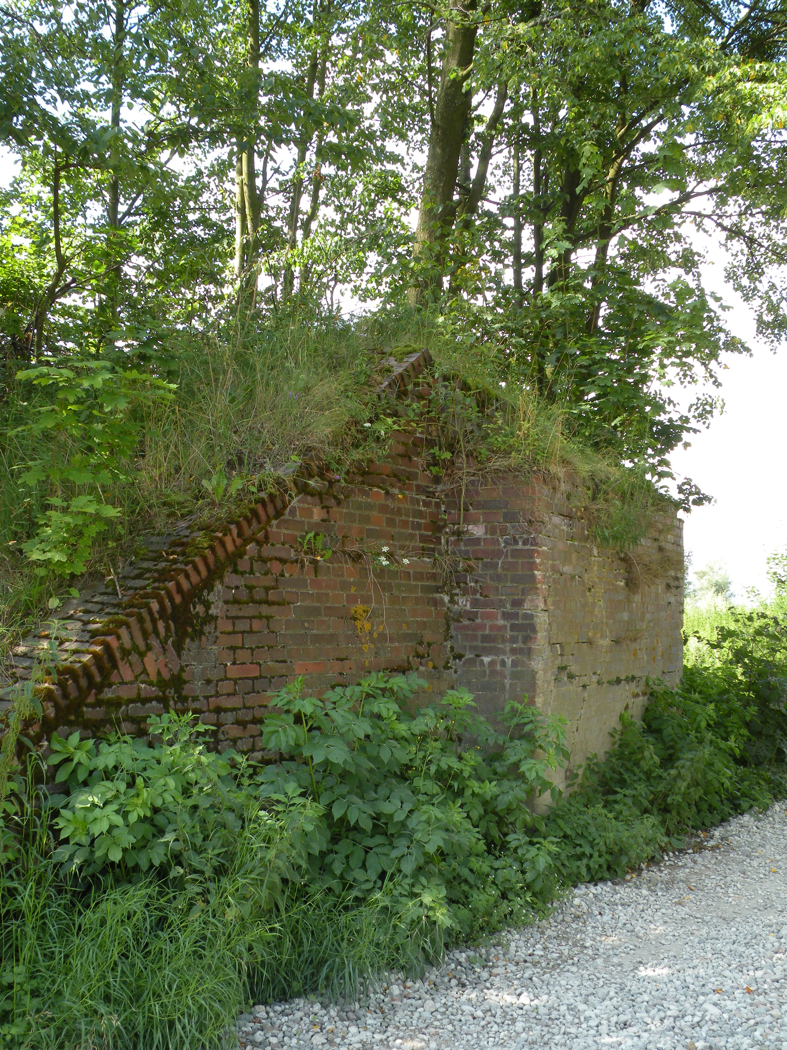 Pozostałoci po wiadukcie linni kolei waskotorowej, droga z Myślic do Pudłowca. Linia waskotorówki biegła z Myślic na północ do Kwietwniewa i wsi Stare Dolno k. Świetego Gaju.